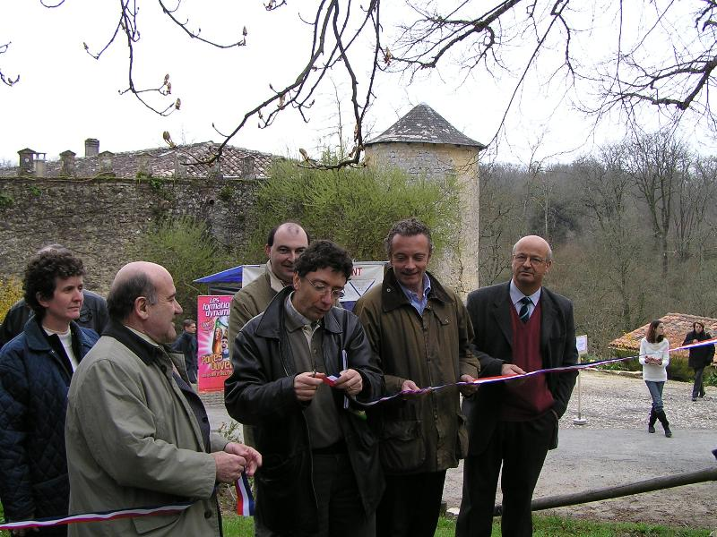 inauguration du sentier botanique